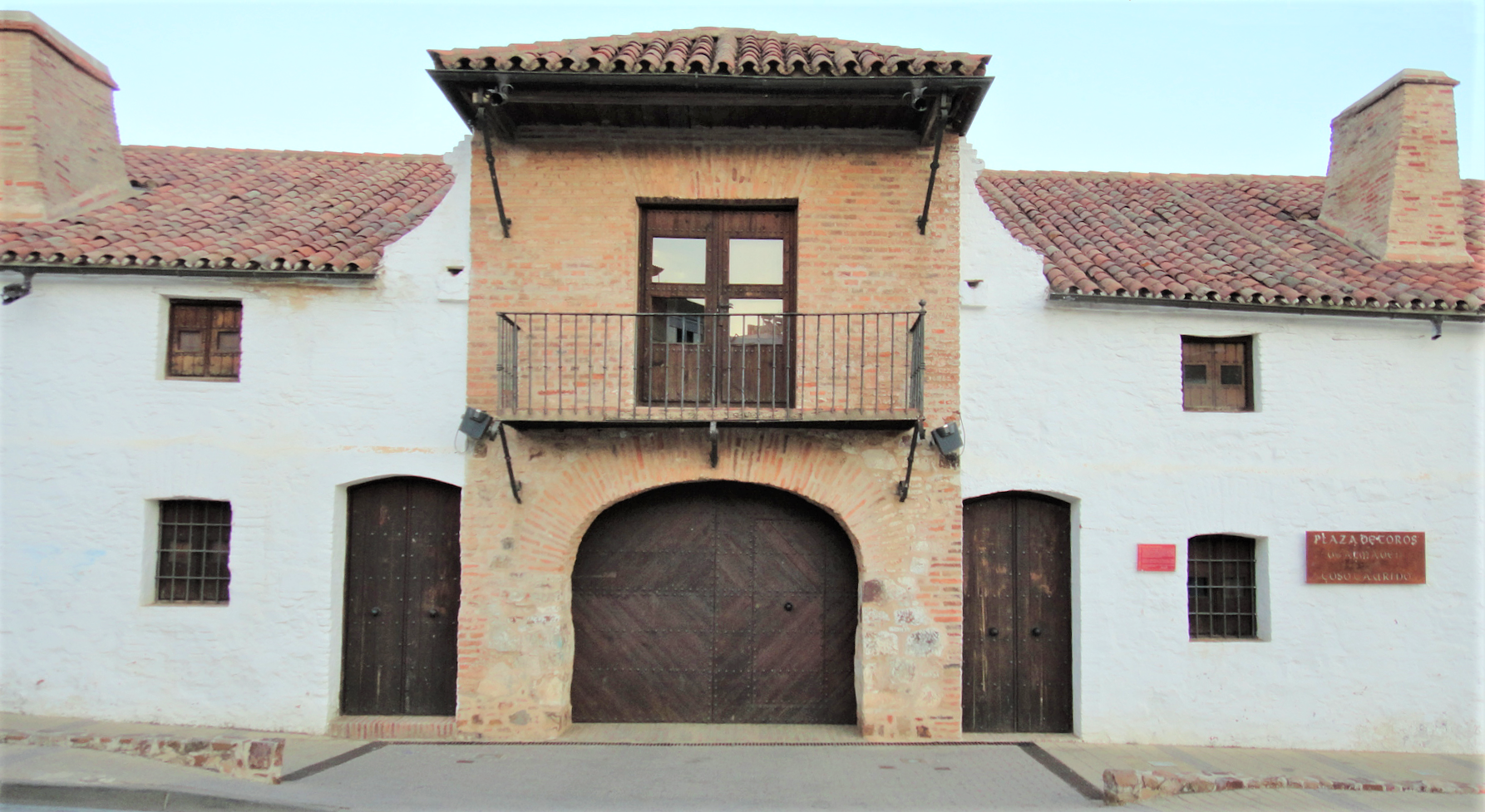 Pórtico de la Plaza de toros de Almadén (Provincia de Ciudad Real - España) denominada "Plaza Nueva"; cuya originalidad es su forma hexagonal.